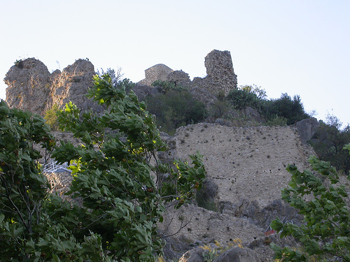 Vista desde abajo del castillo nazarí de Zahara de la Sierra, Cádiz, España